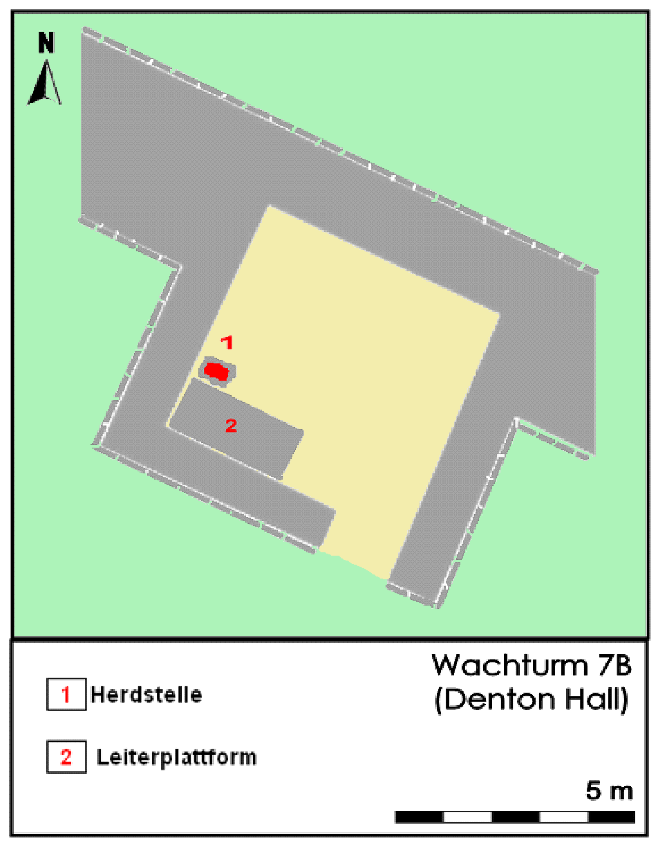 Befundskizze Wachturm 7B (Denton Hall), Hadrianswall (GB).